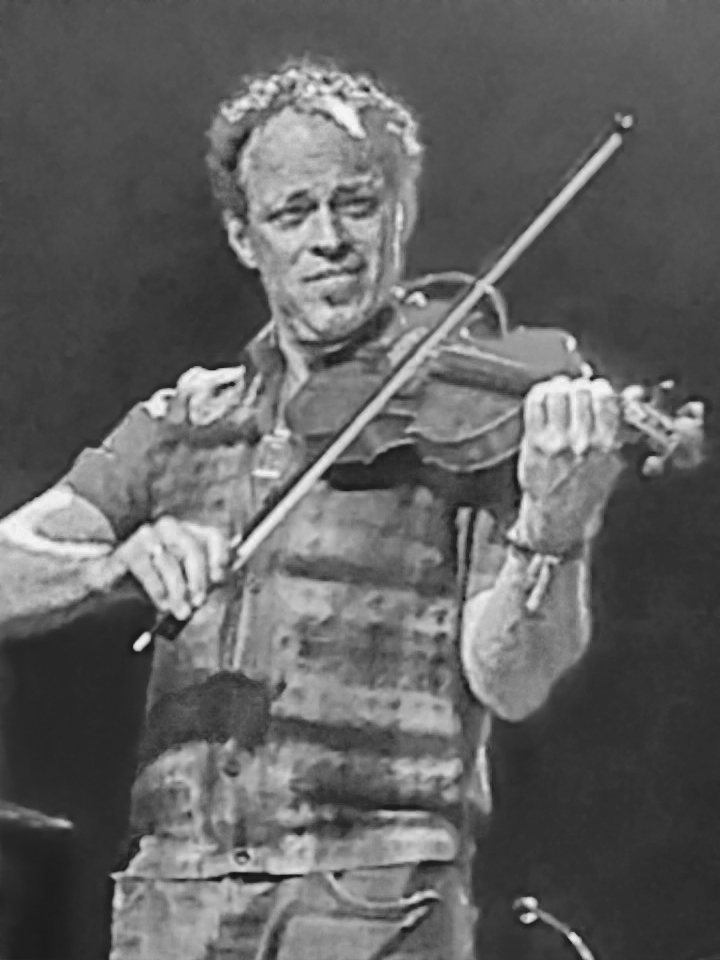 Gregor Hübner am 3. Oktober 2018 im Zirkus Krone